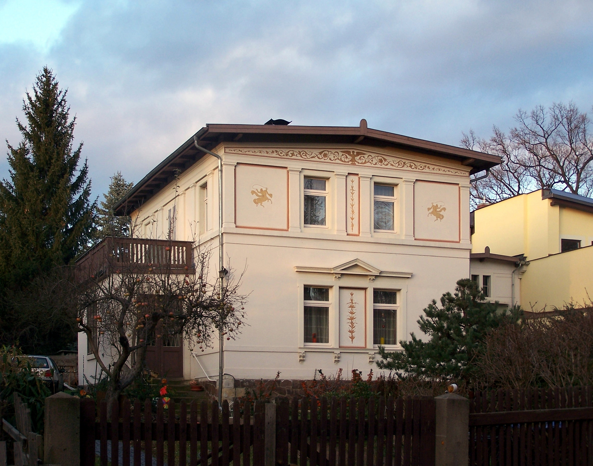 Nizzastr. 11 in Radebeul